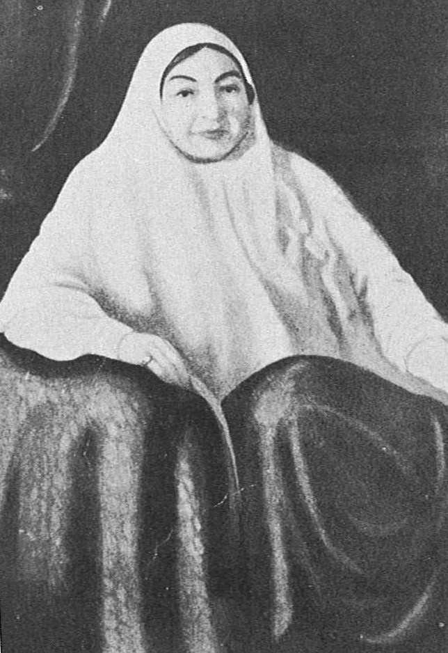 بی‌بی شمس‌الملوک (لِیدی علی‌شاه) همسر آقاخان دوم